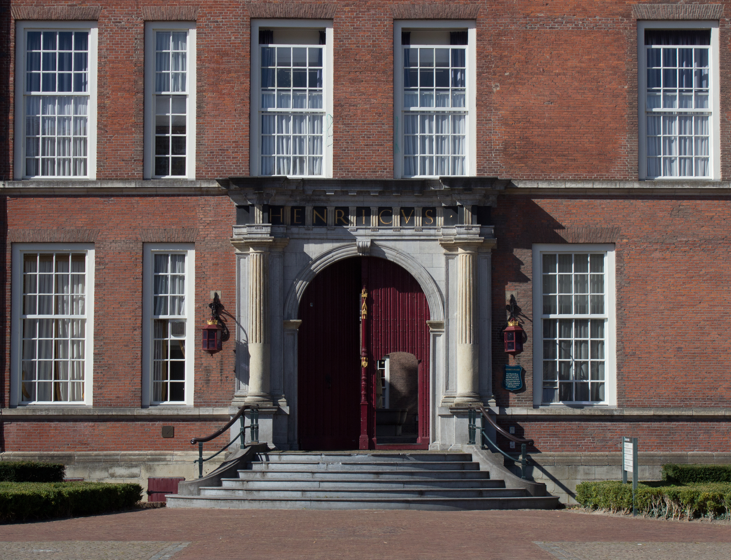 Zicht op detail van de ingang van het kasteel van Breda. Gevestigd in het centrum van Breda